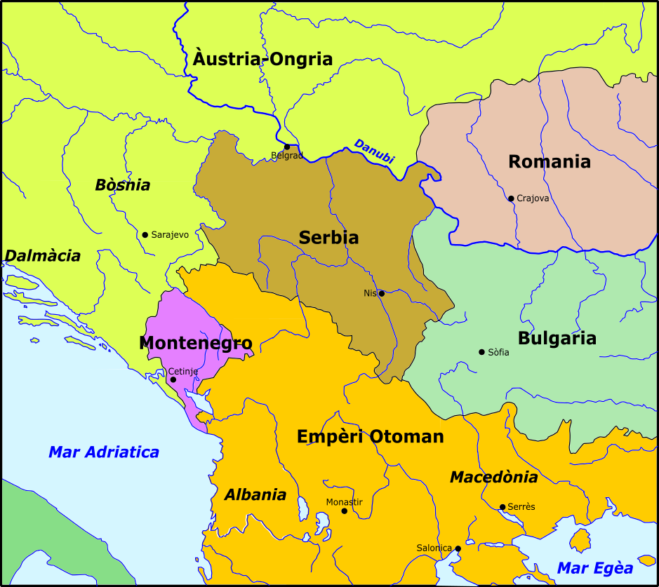 Serbia après lo Congrès de Berlin de 1878.